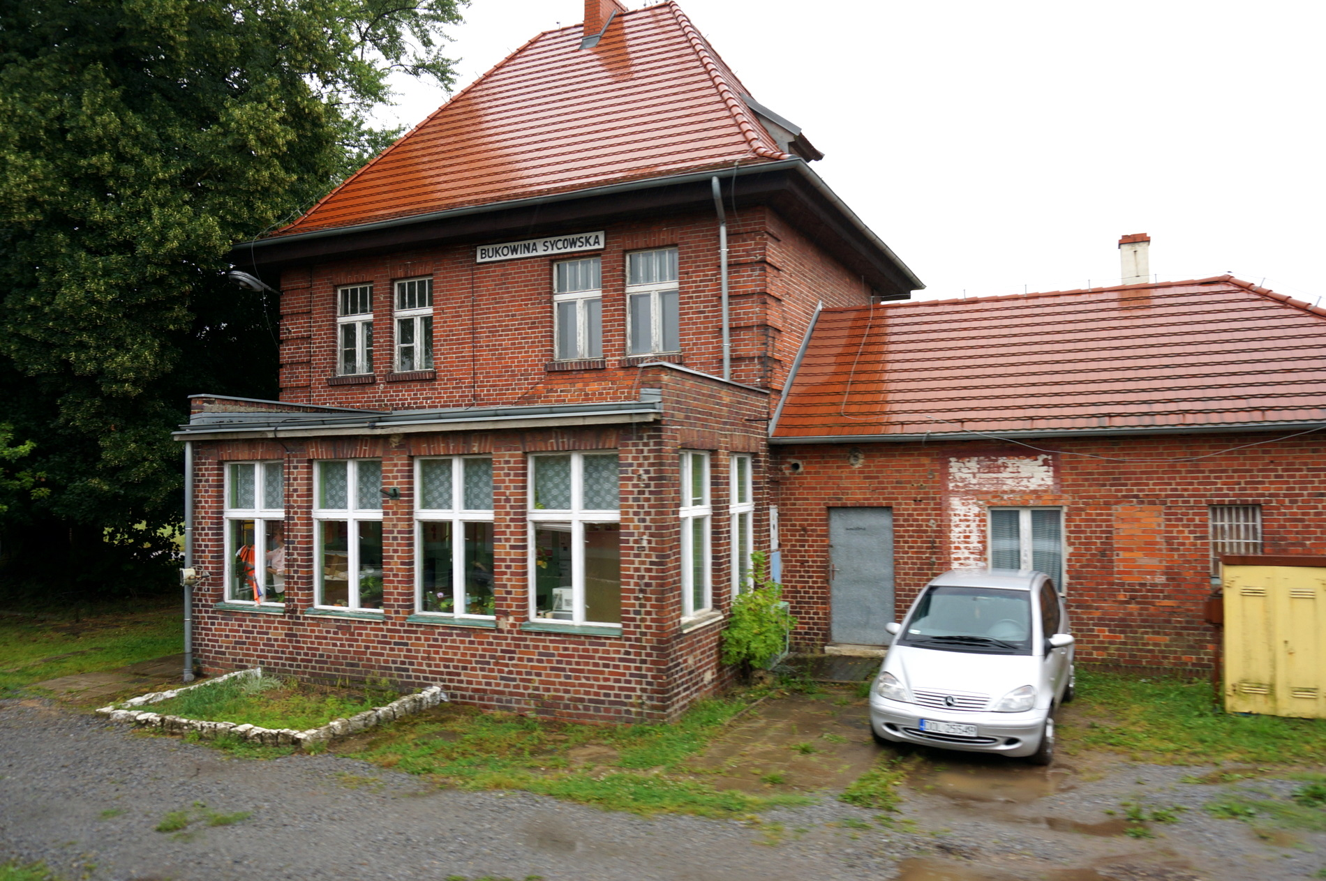 Stacja kolejowa w Bukowinie Sycowskiej, w województwie dolnośląskim, w powiecie oleśnickim, w gminie Międzybórz, na linii kolejowej 355 0strów Wlkp. - Grabowno Wielkie.